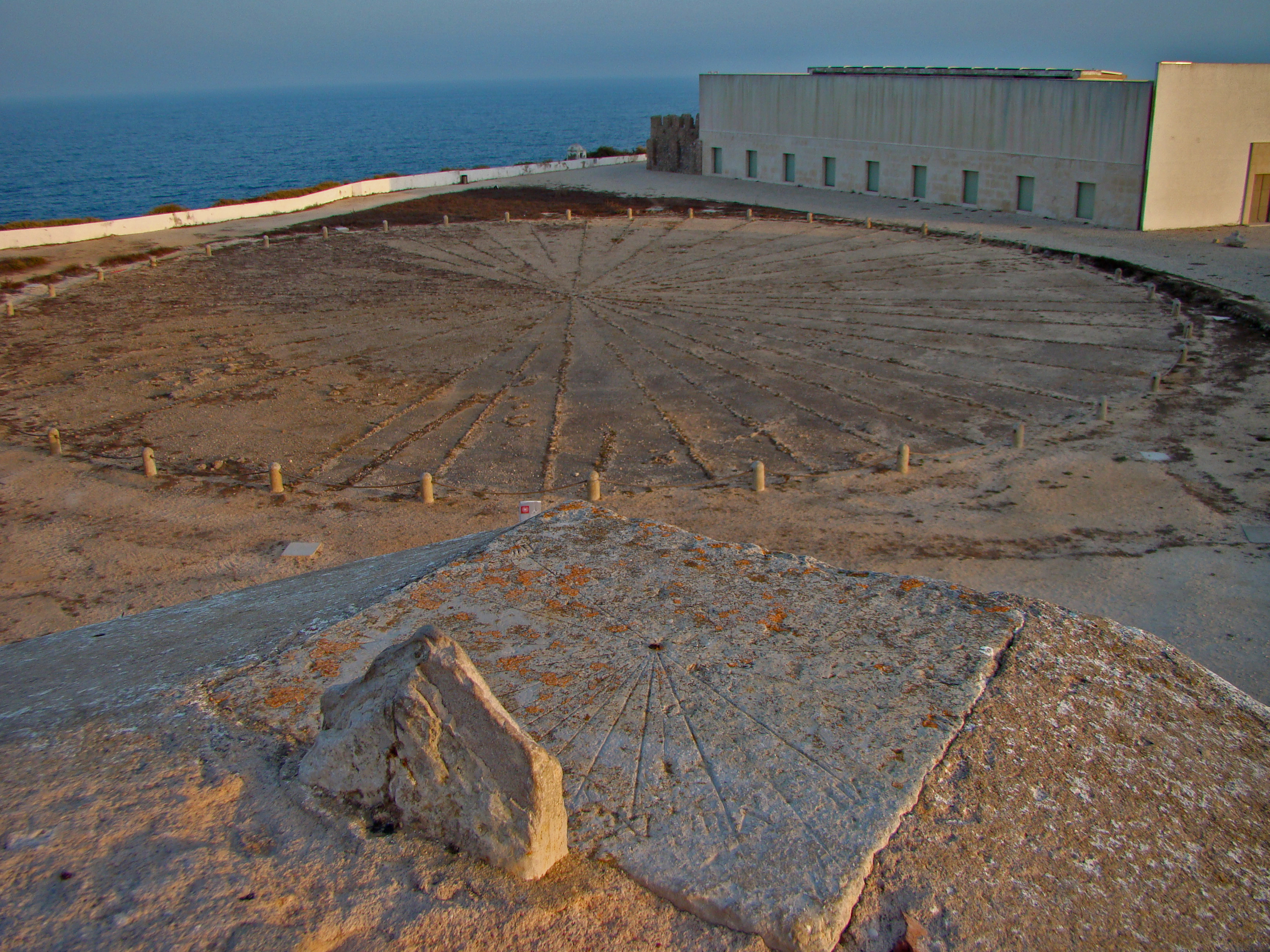 Relógio de sol